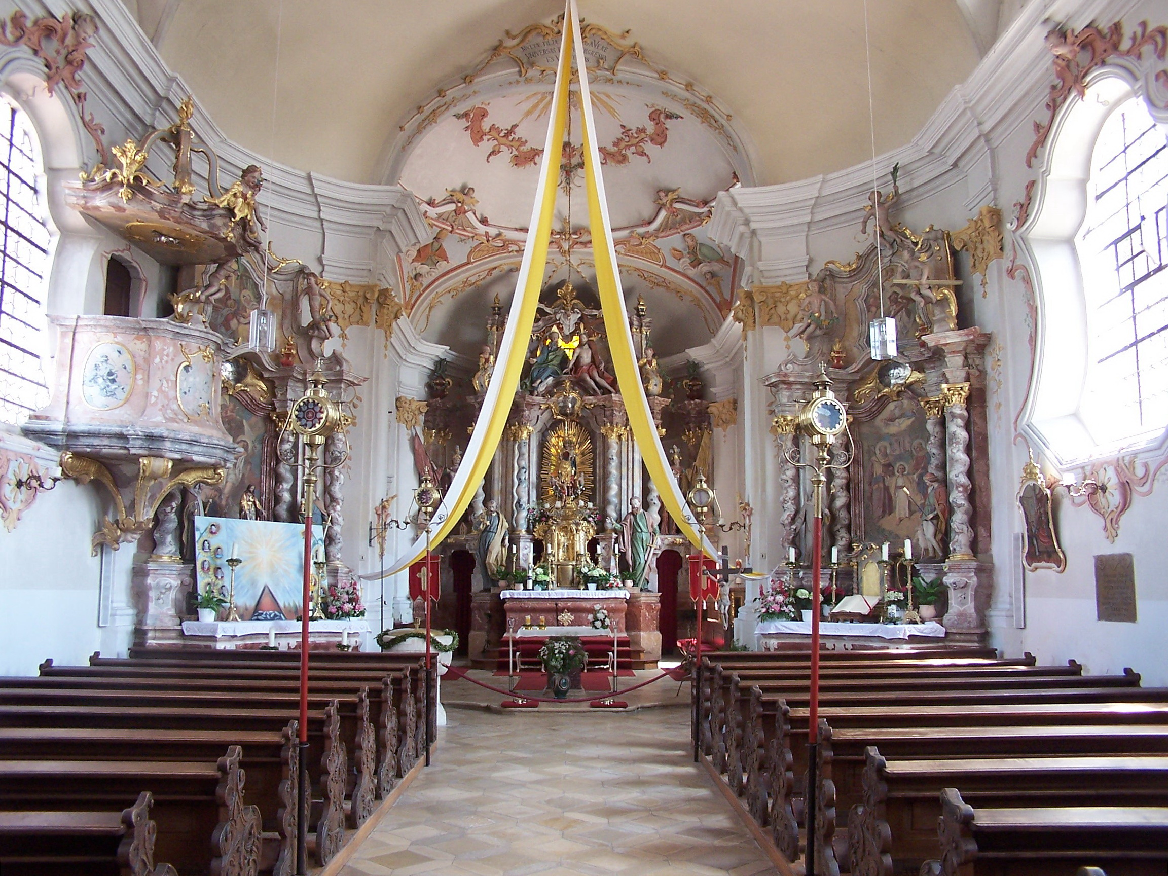 Rottenburg an der Laaber. Oberhatzkofen, Schulweg 3. Katholische Pfarrkirche Mariä Himmelfahrt. Der eingezogene Chor hat ein Joch und Halbkreisschluss, das Langhaus 3 Joche und ist an den vier Ecken gerundet. Das Langhaus hat ein flaches Tonnengewölbe mit Stichen. Die Wände sind durch Pilaster mit korinthisierenden Kapitellen gegliedert. Durchlaufendes Kranzgesims mit lebhafter Profilierung. Große Bassgeigenfenster bringen viel Licht in den Raum.